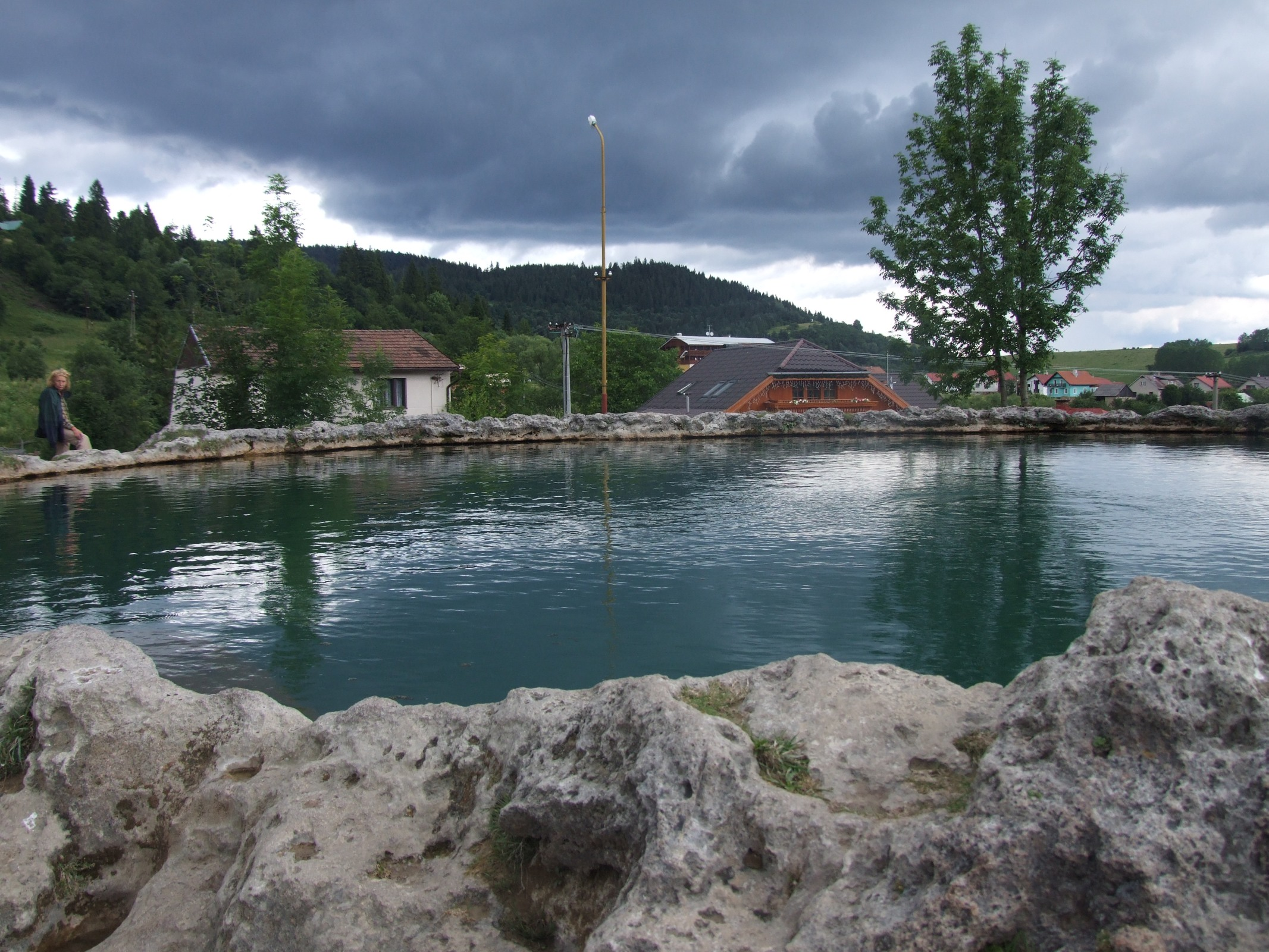 "Krater". Naturalny basenik z wodą termalną.Vyšne Ružbachy, Słowacja